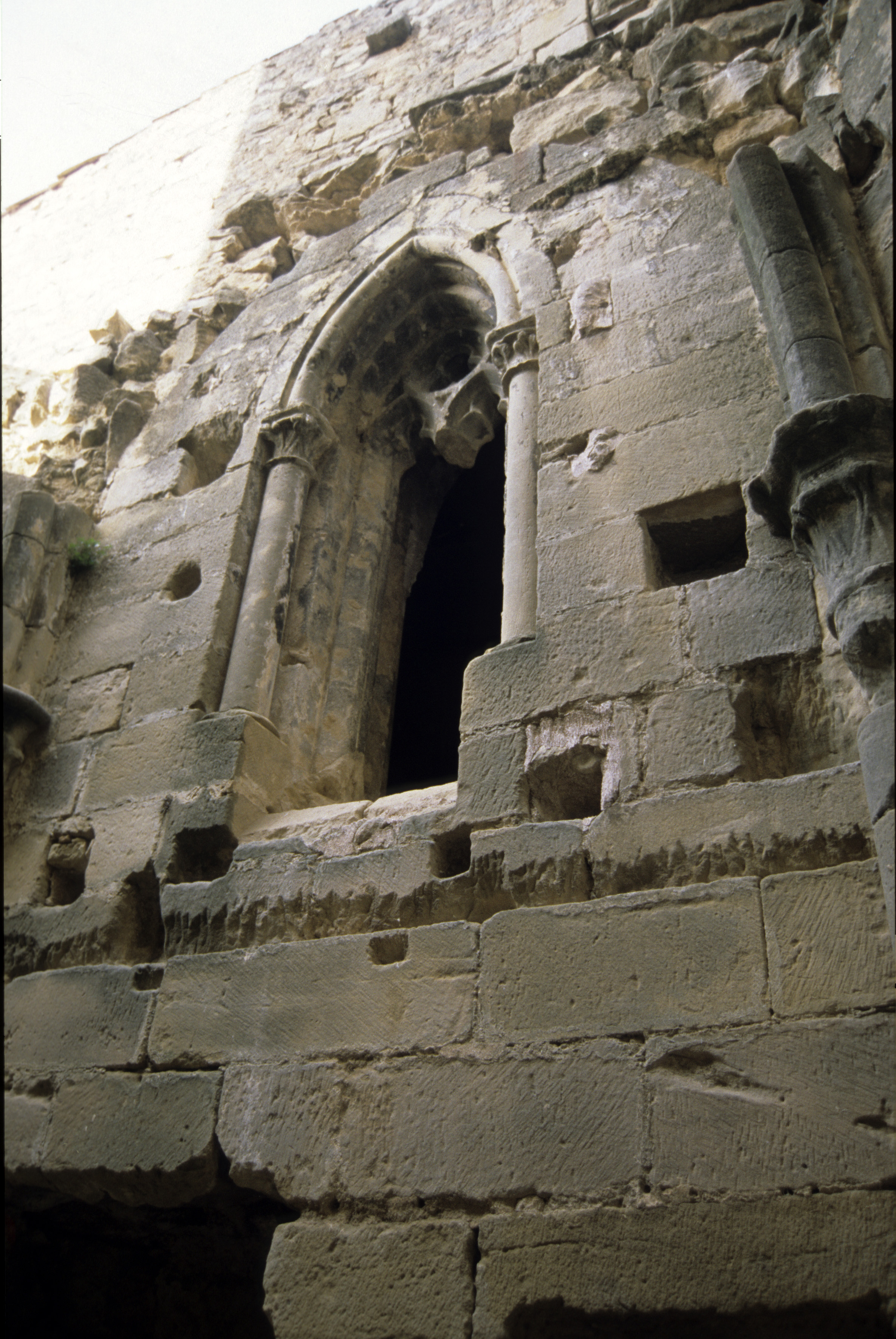 Arnes (Terra Alta). Absis de l'antiga parroquial de Sta. Magdalena. Fot. 1998.